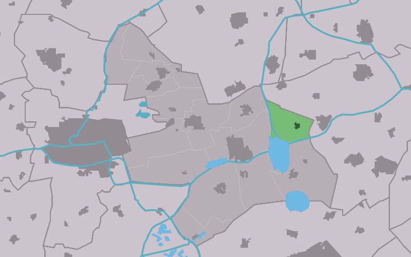 Kaartsje fan himrik fan Jistrum